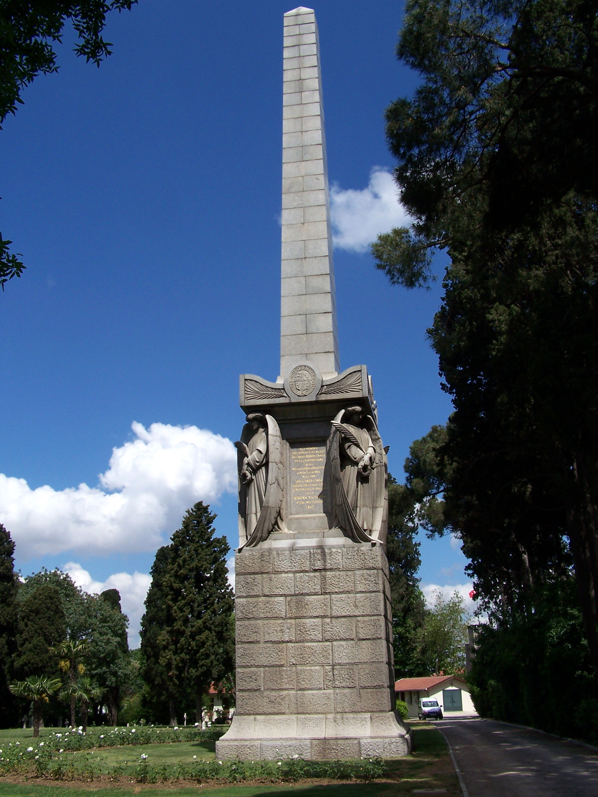 Monument to victims of Crimean War at Haydarpaşa Mezarlığı